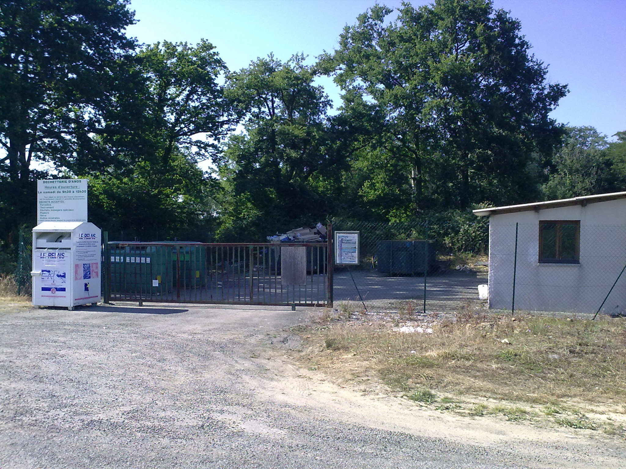 Déchetterie d'Anos.